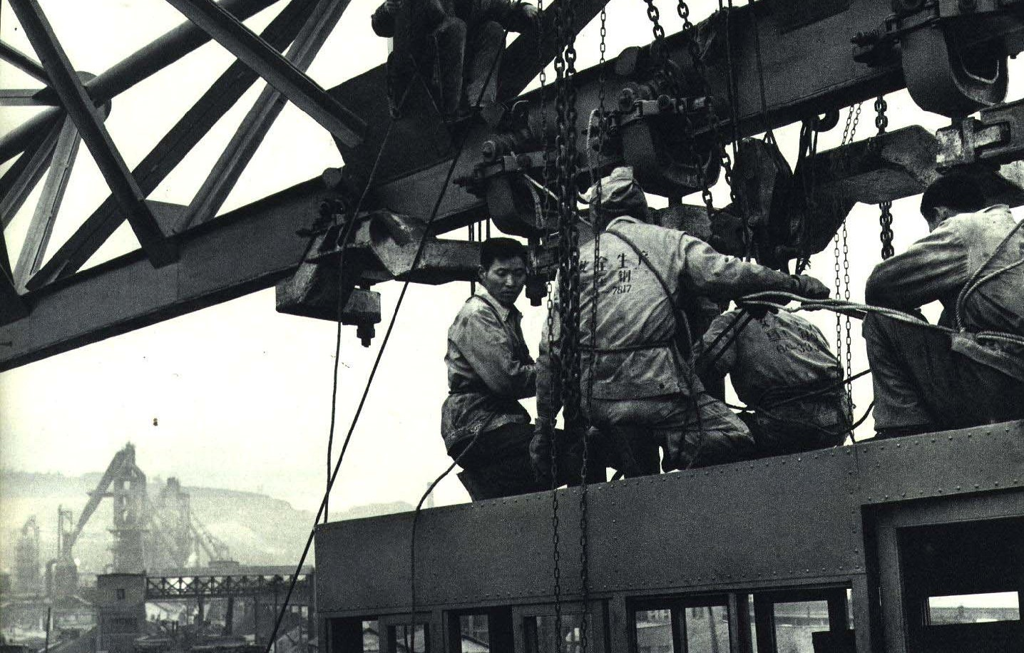 1965-8 1965 重庆钢铁厂 黄荣昌